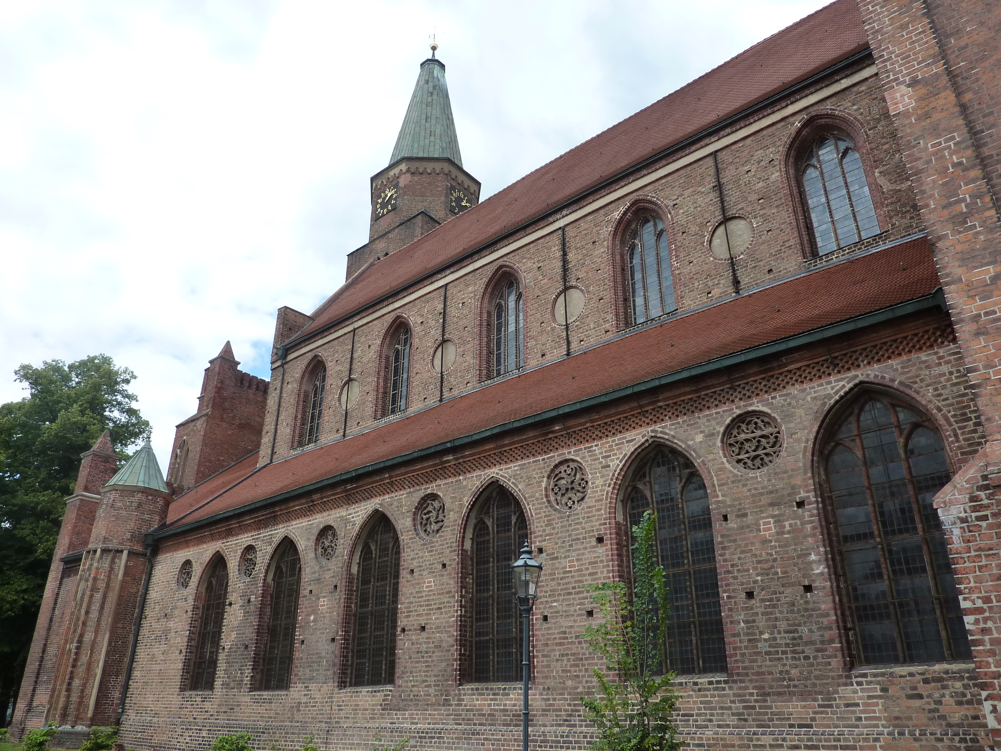 Dom St. Peter und Paul in Brandenburg an der Havel